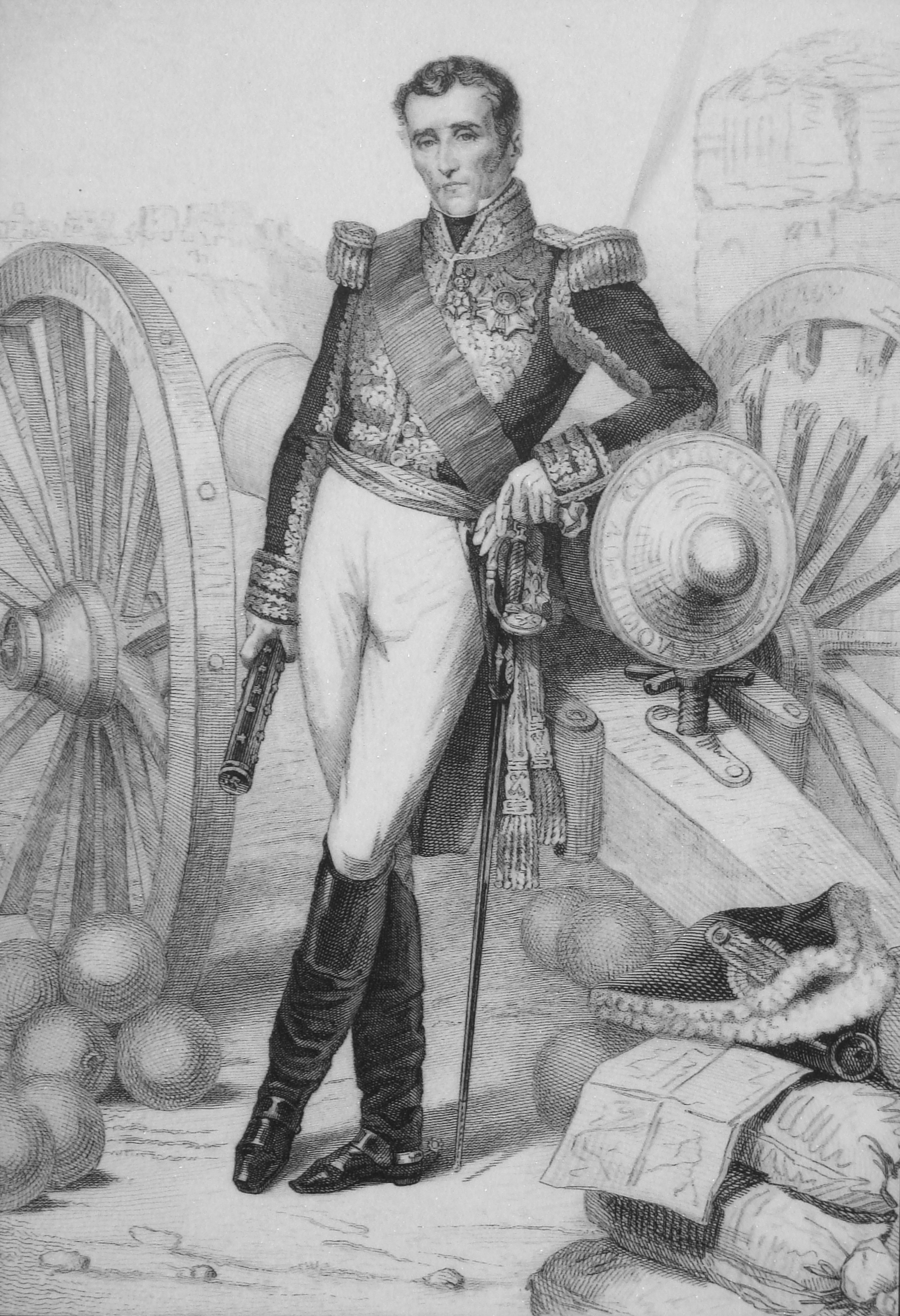 Maréchal_Sylvain_Charles_Valée